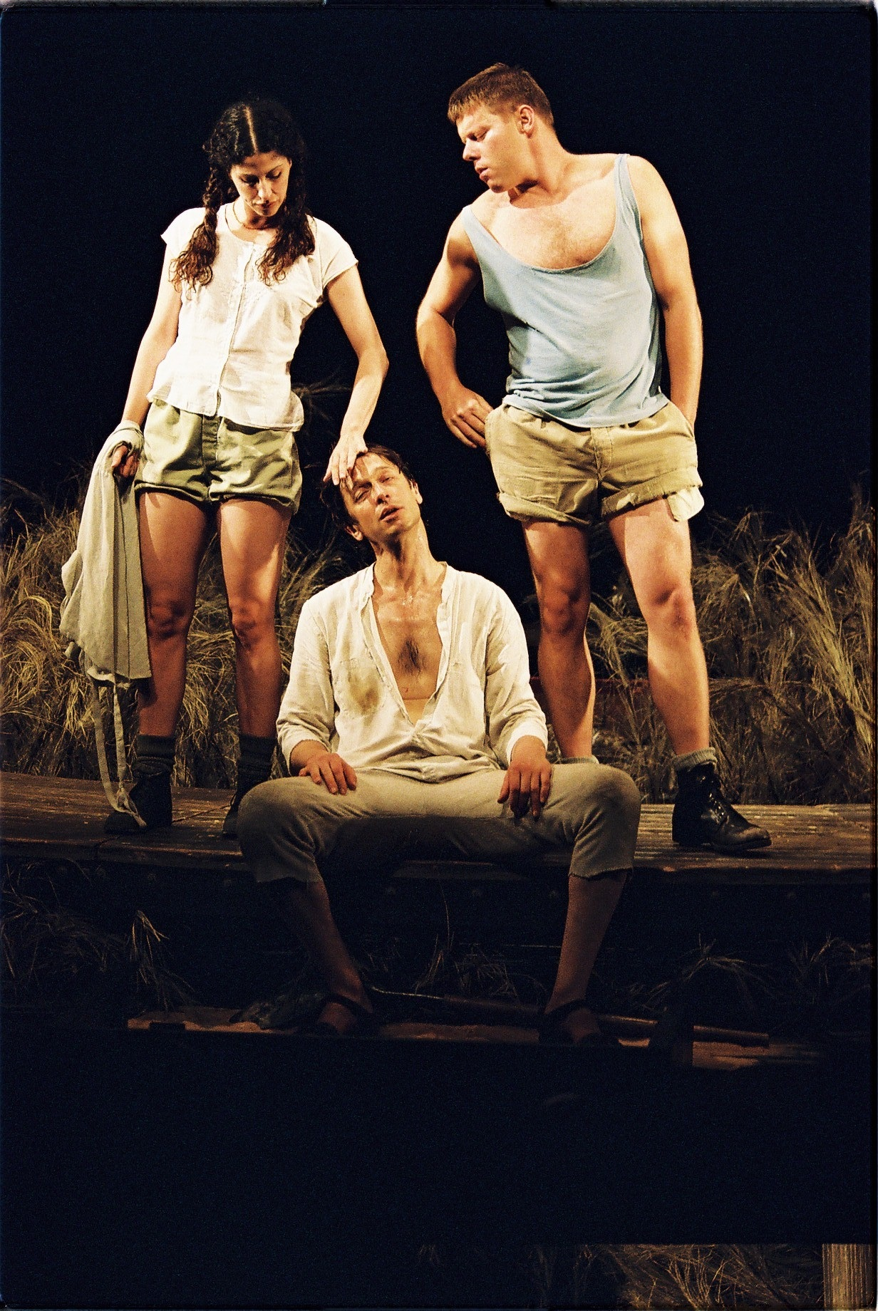 אפרת בן-צור, סשה דמידוב ואמנון וולף בהצגה "כפר", תיאטרון גשר